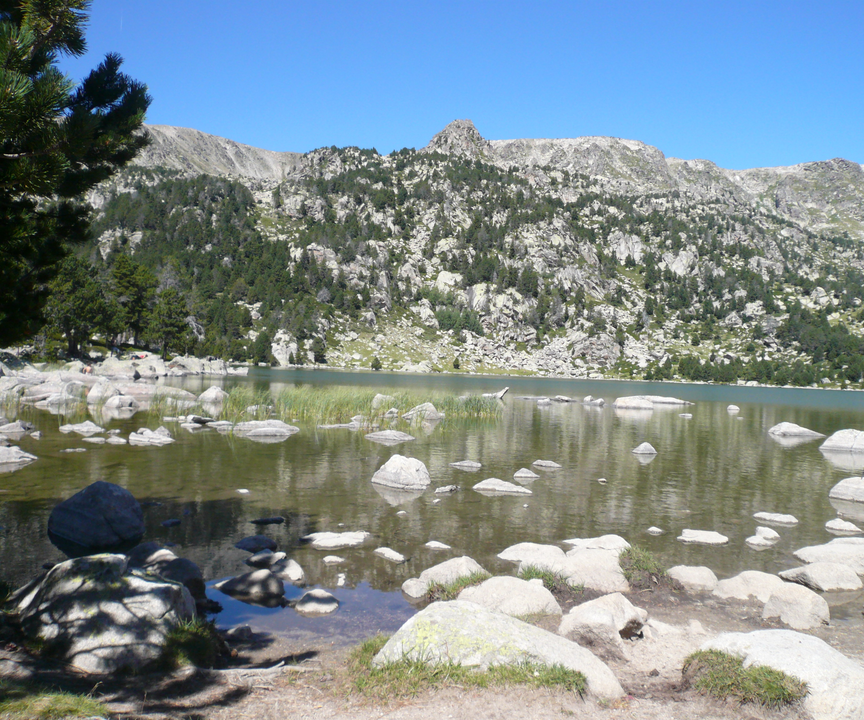 Estany de Malniu (Cerdanya) (Meranges). Estanys i llacs d'alta muntanya. This is a a photo of a wetland in Catalonia, Spain, with id: IZHC-18001504 Object location42° 28′ 19.92″ N, 1° 47′ 29.4″ E